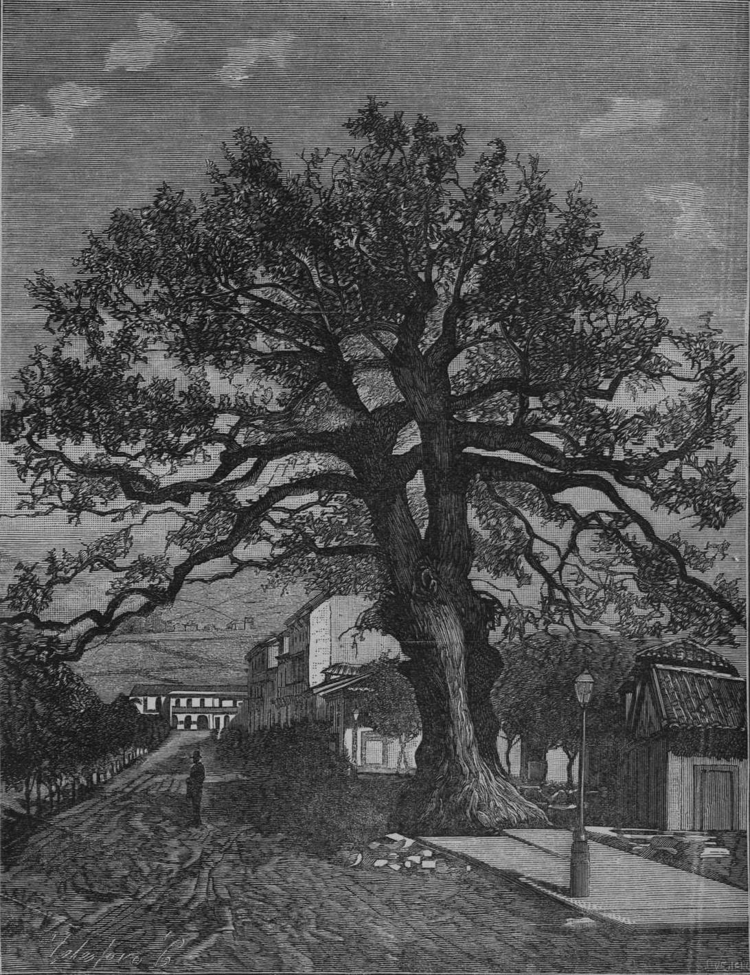 El antiguo Carbayón, que estaba situado en la Calle de Uría de la ciudad de Oviedo, España, y que ha dado nombre a los ovetenses